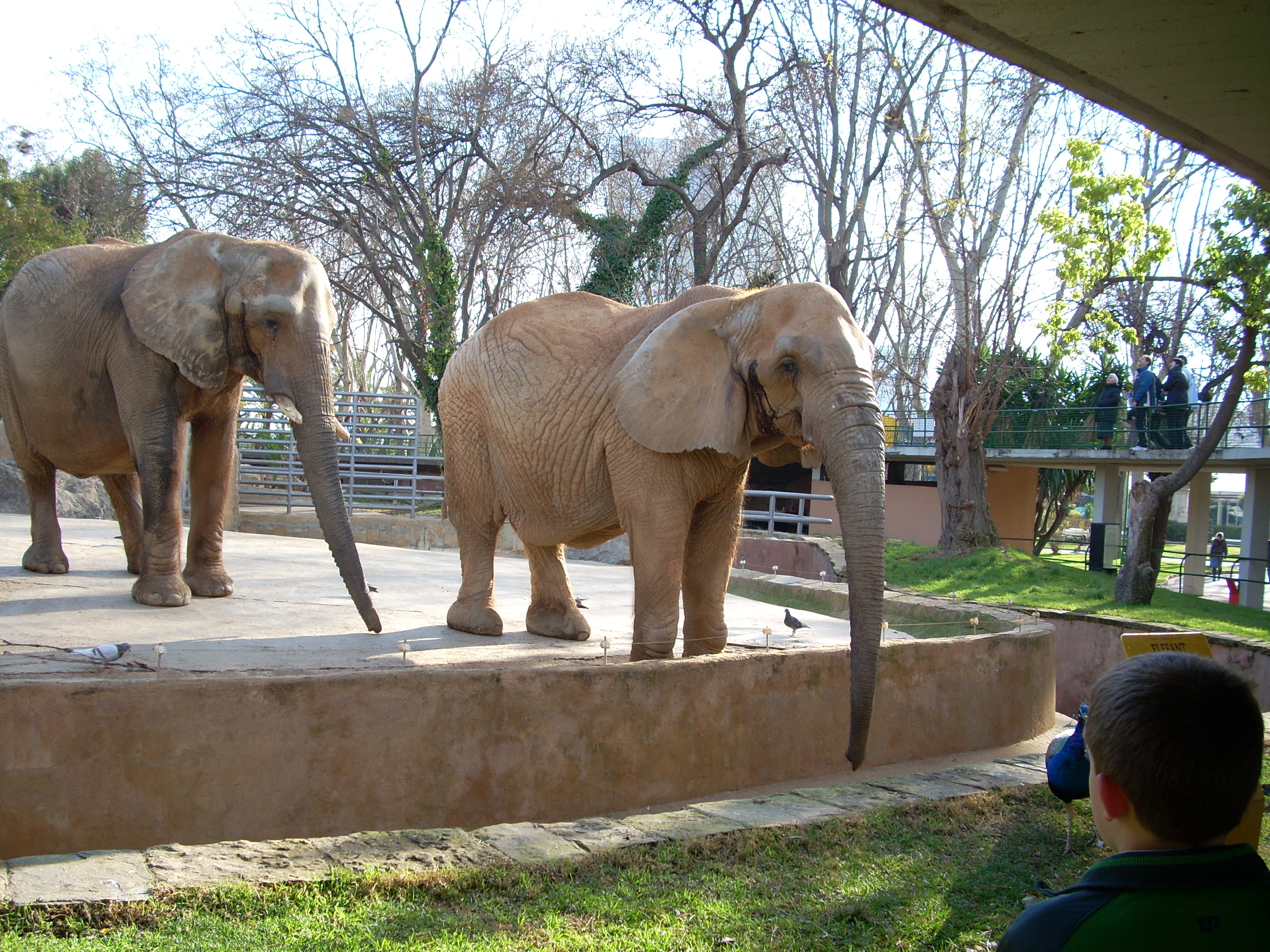 Elefantes,Zoo Barcelona,España.